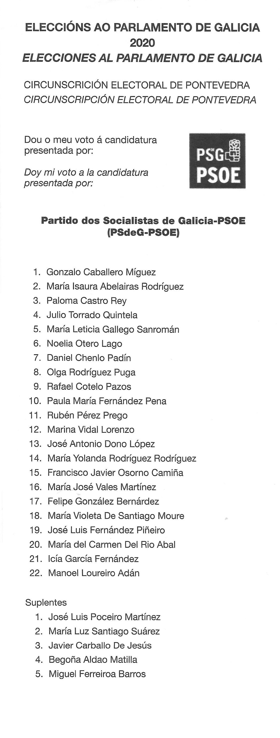 Papeletas electorais Eleccións ao Parlamento de Galicia 2020 pospostas circunscrición electoral de Pontevedra-PSdeG PSOE.